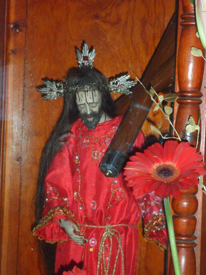 Jesús de las Maravillas es el patrón de la parroquia que lleva su mismo nombre, la cual está ubicada en la plaza principal de Palmarito Tochapán.